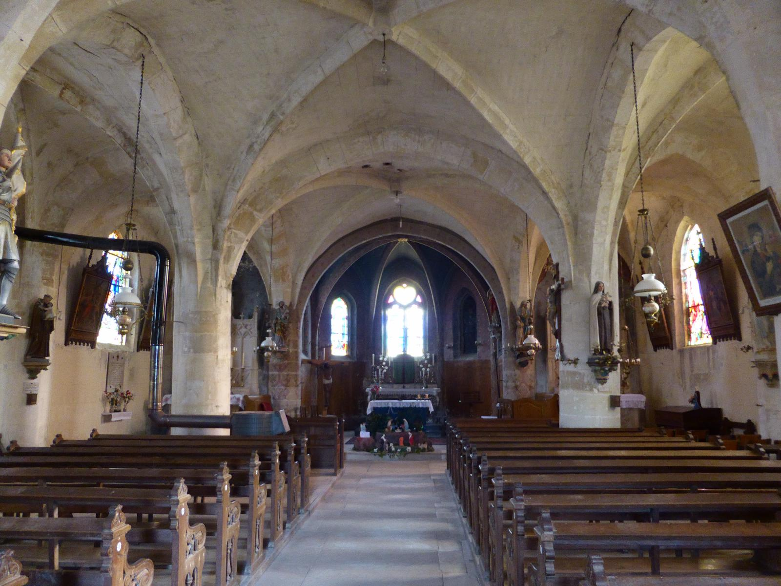 Source : Pouillé de Verdun